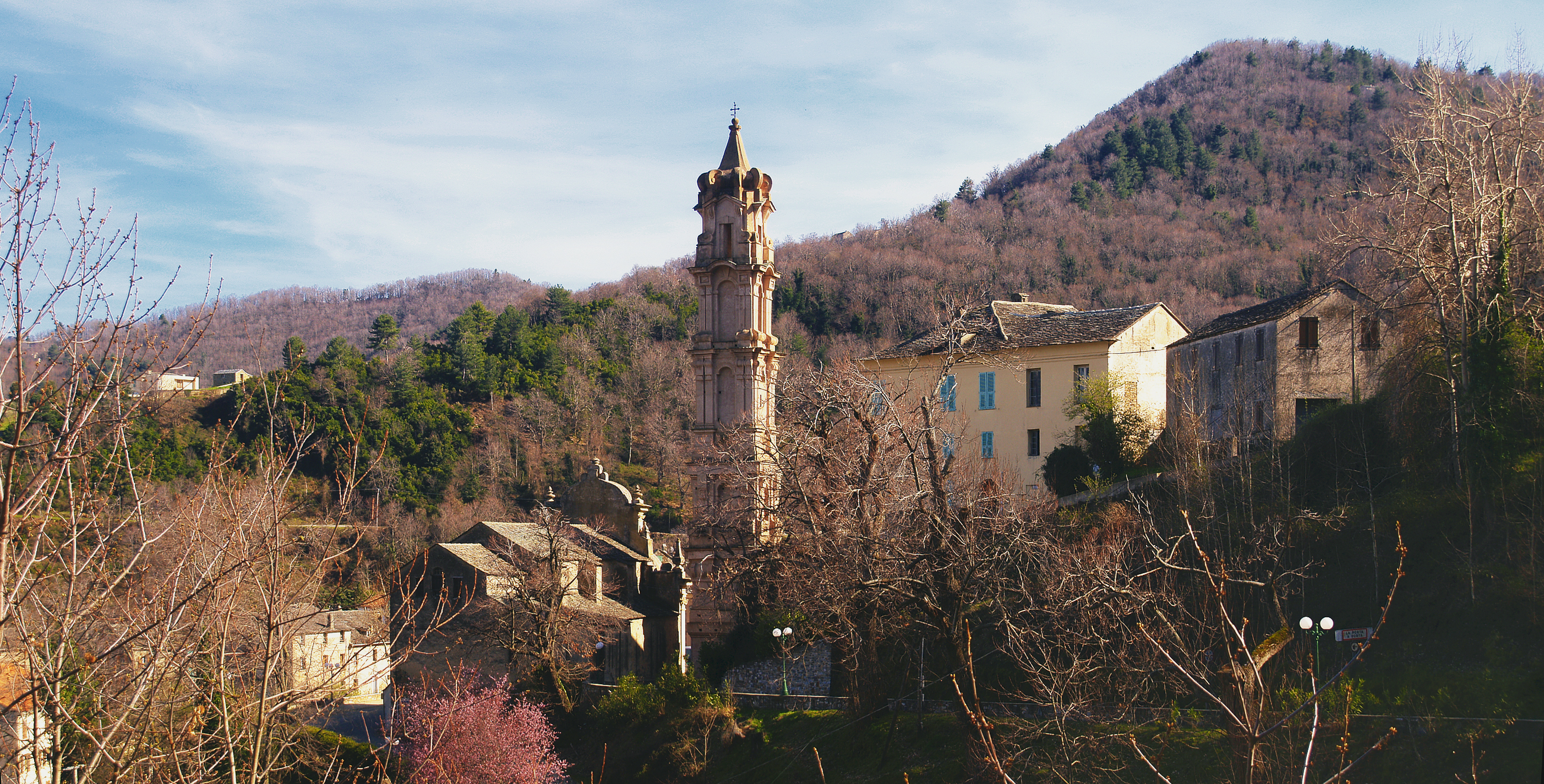 La Porta - Village